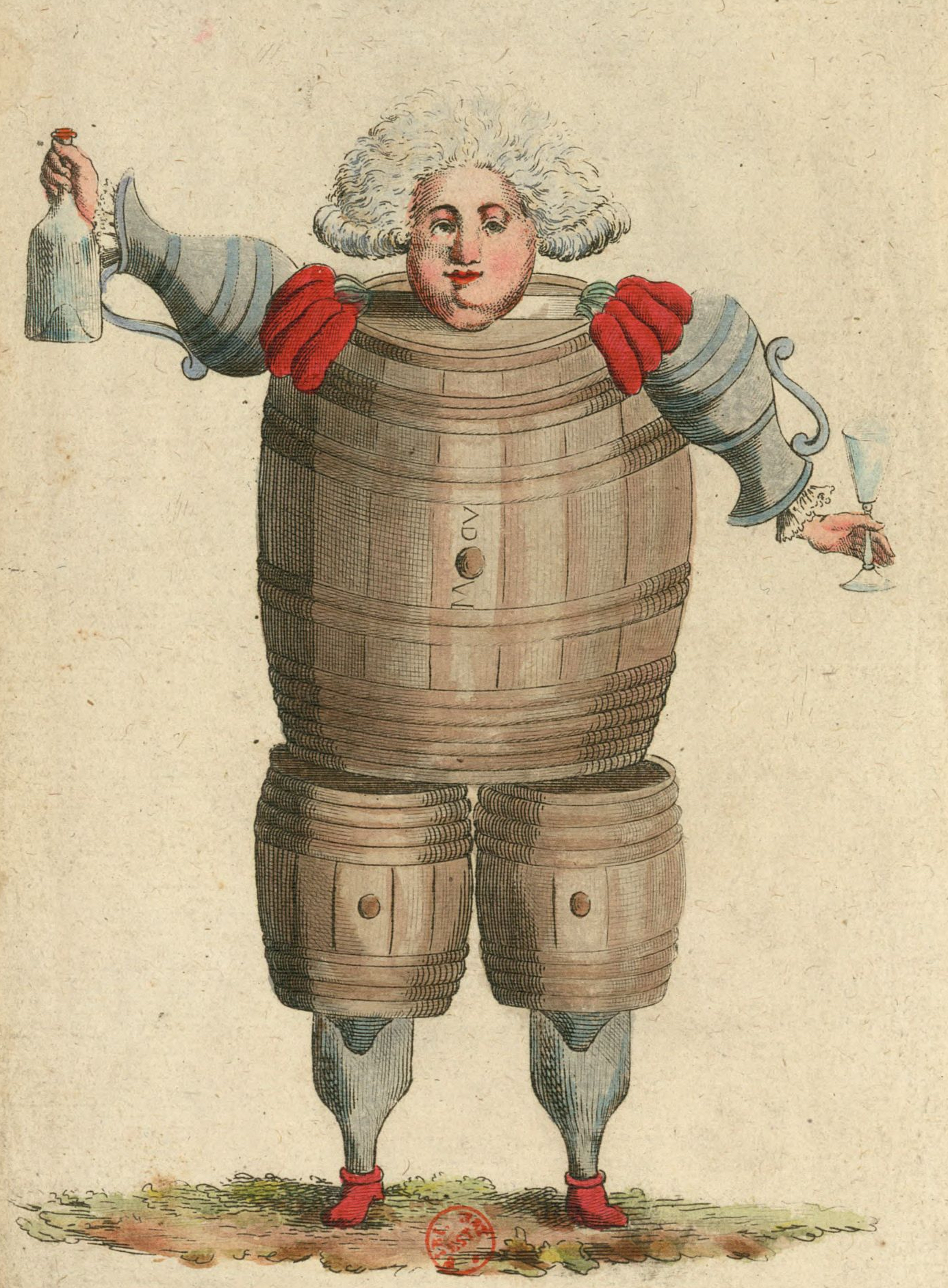 Caricature anonyme de la fin du 18e siècle du vicomte de Mirabeau, dit Mirabeau-Tonneau